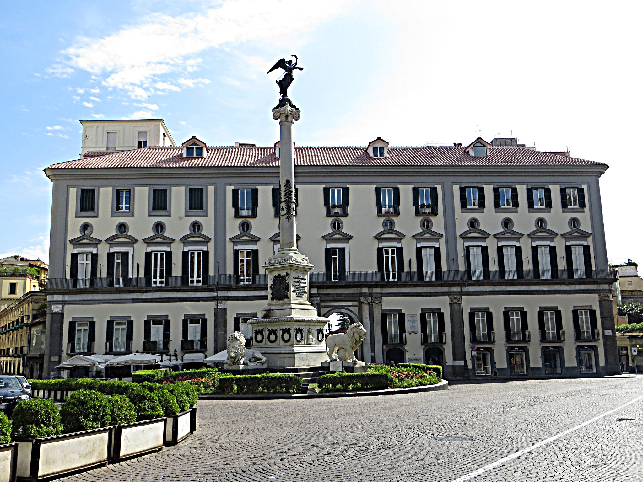 Piazza dei Martiri - Unione Industriali Napoli